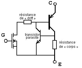 Circuit équivalent d'un IGBT